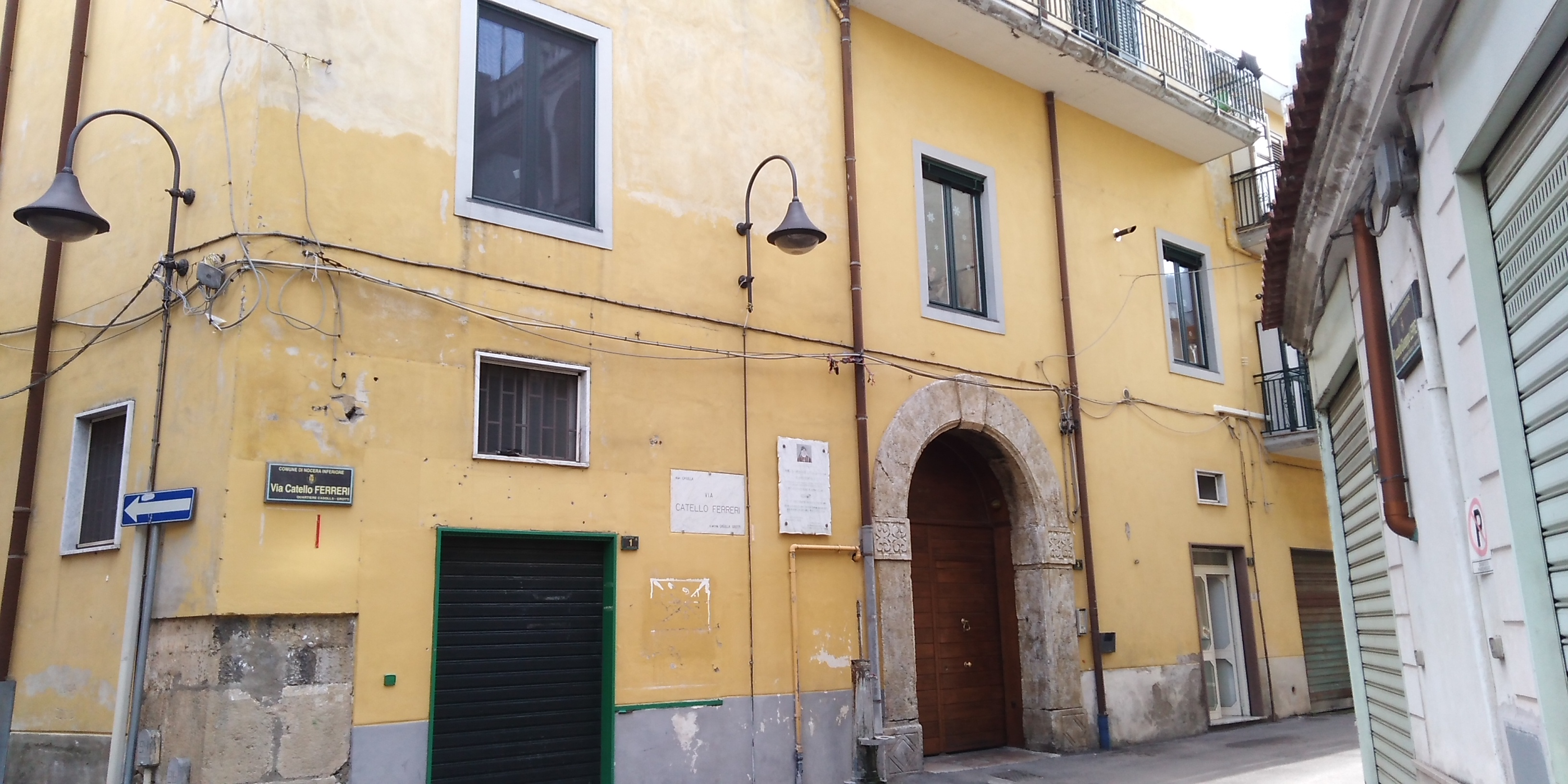 Prospetto dell'ex istituto delle figlie di Maria a Casolla